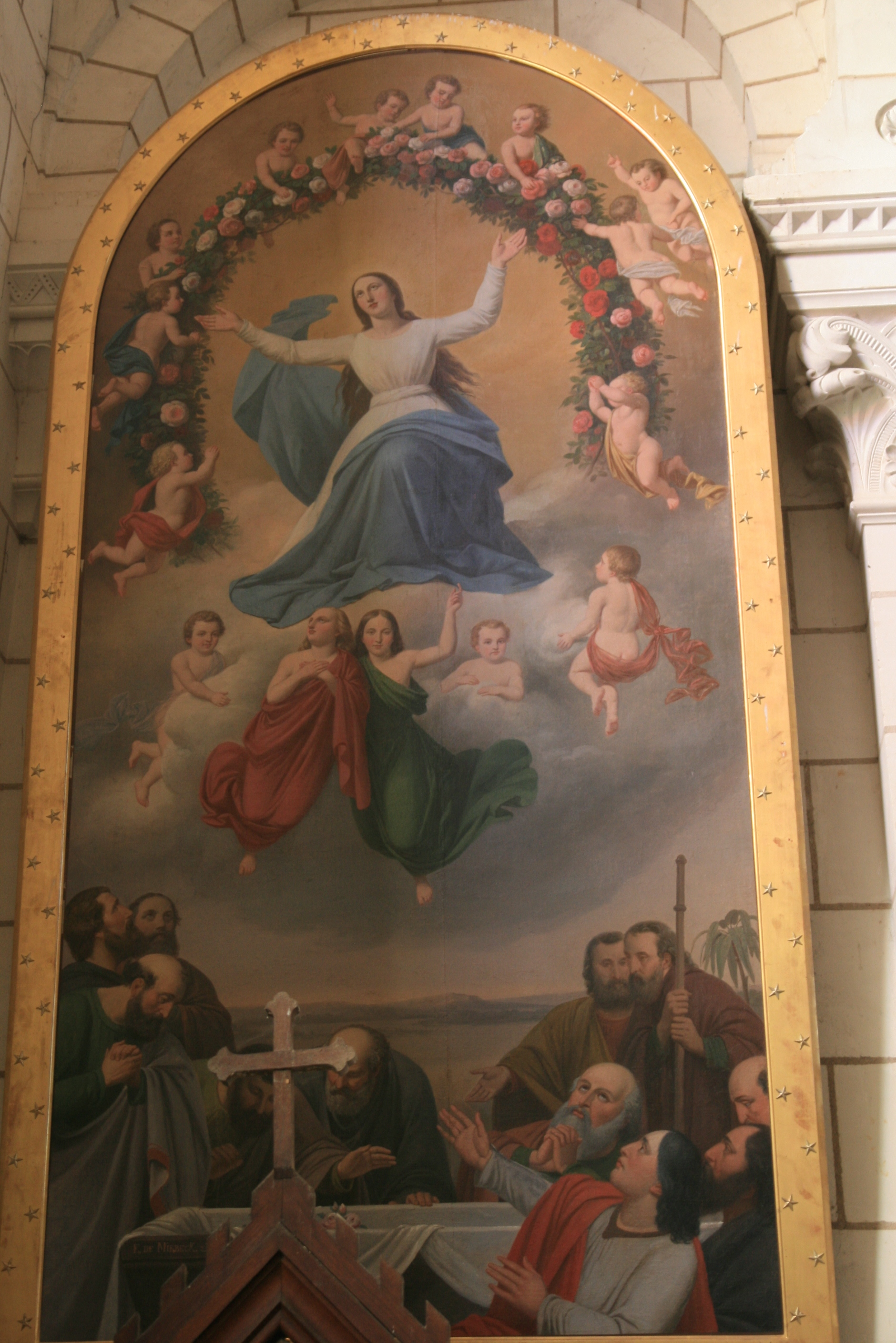 La vierge à l'Enfant, Vierge apparaissant à un religieux. tableau qui date du XVIIe siècle. Il fait l'objet d'un classement au titre des monuments historiques depuis le 20 octobre 1913.